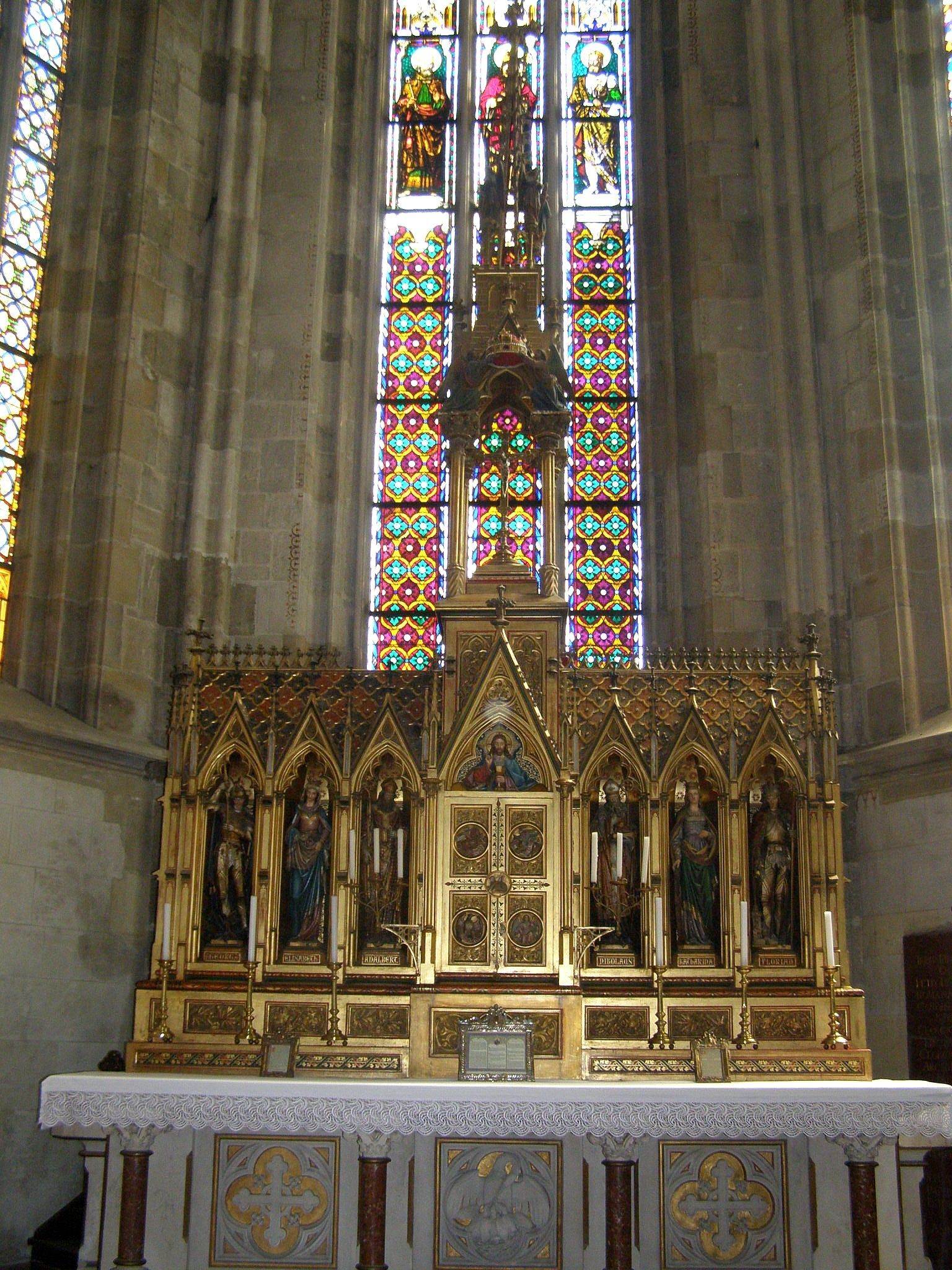 Neogotický hlavný oltár Katedrály svätého Martina v Bratislave pochádza z roku 1867